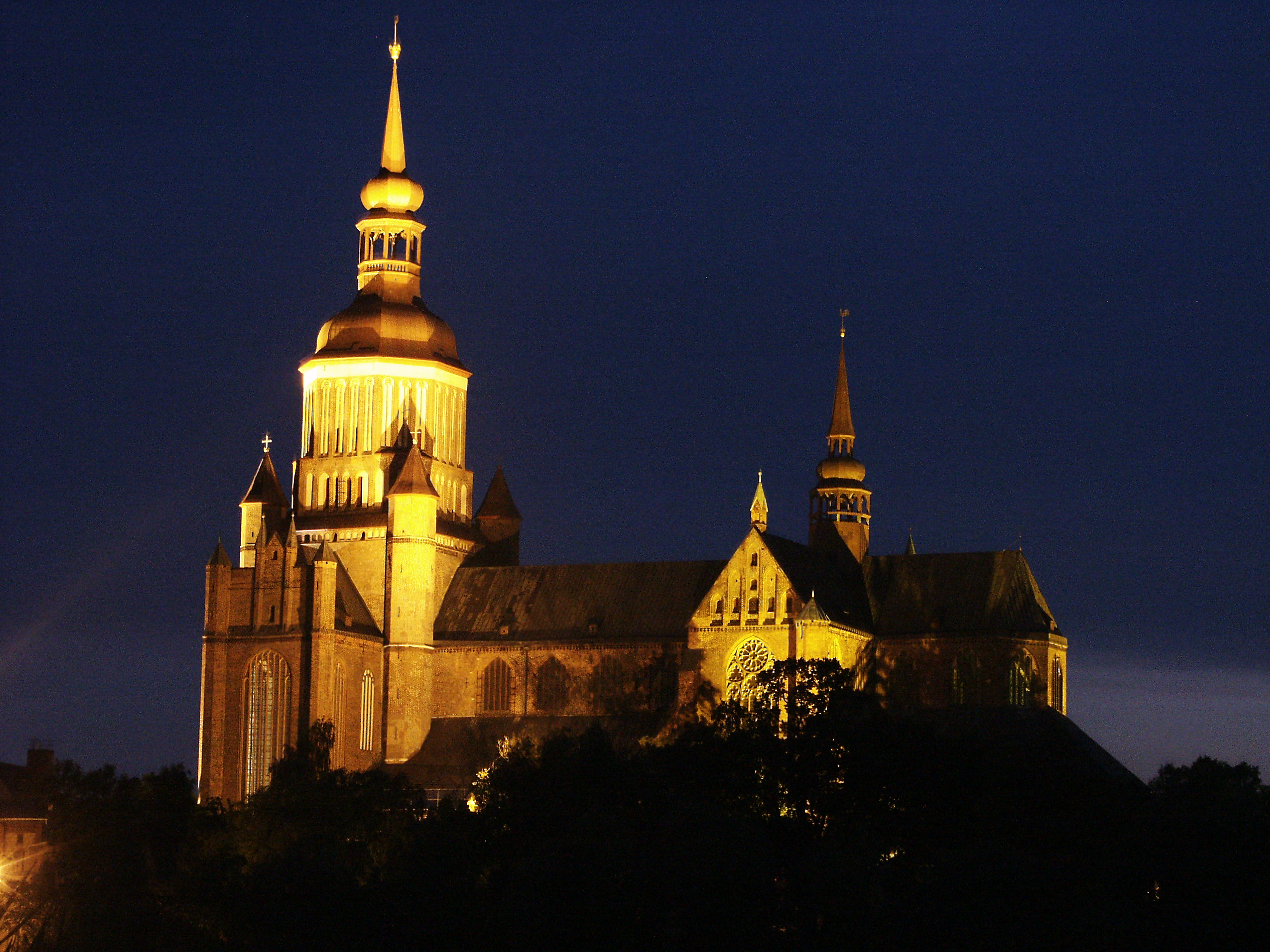 Stralsund Marienkirche Nachtaufnahme